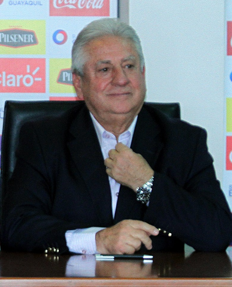 Luis Chiriboga Acosta, presidente de la Federación Ecuatoriana de Fútbol.